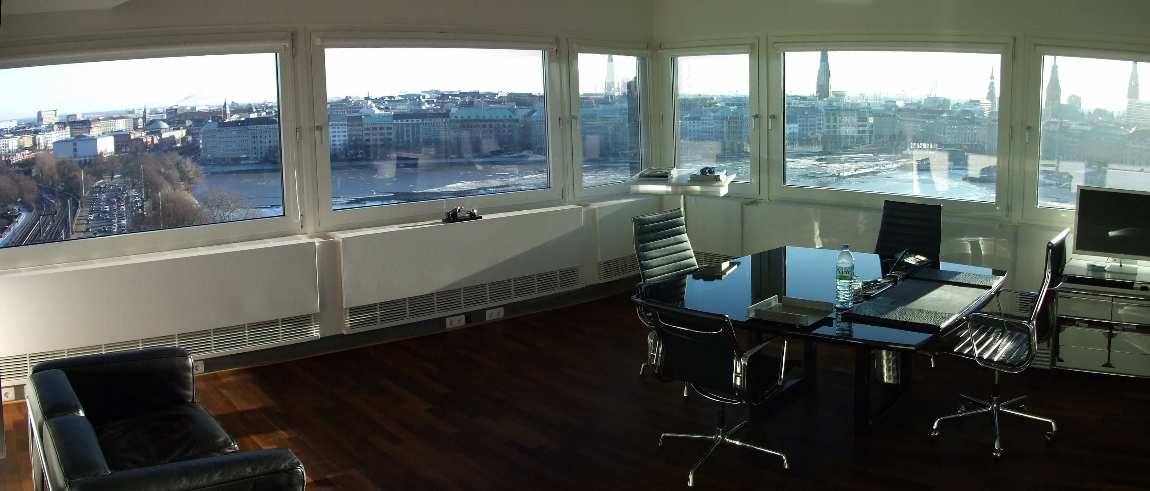 Blick im 12. Stock des Finnlandhauses in südöstlicher Richtung über die Binnenalster